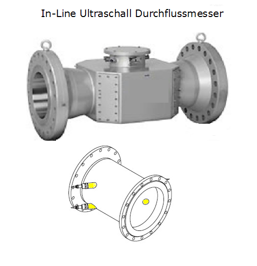 In Line Ultraschall Durchflussmesser